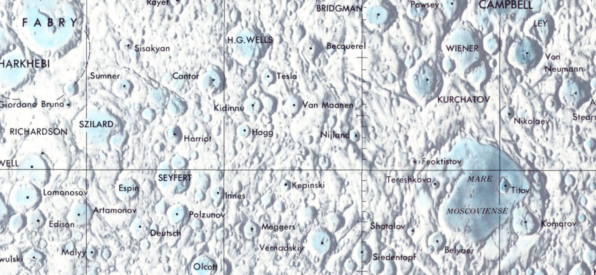 Cráter lunar Van Maanen. Localización. (Lunar Chart LPC1. Second Edition)